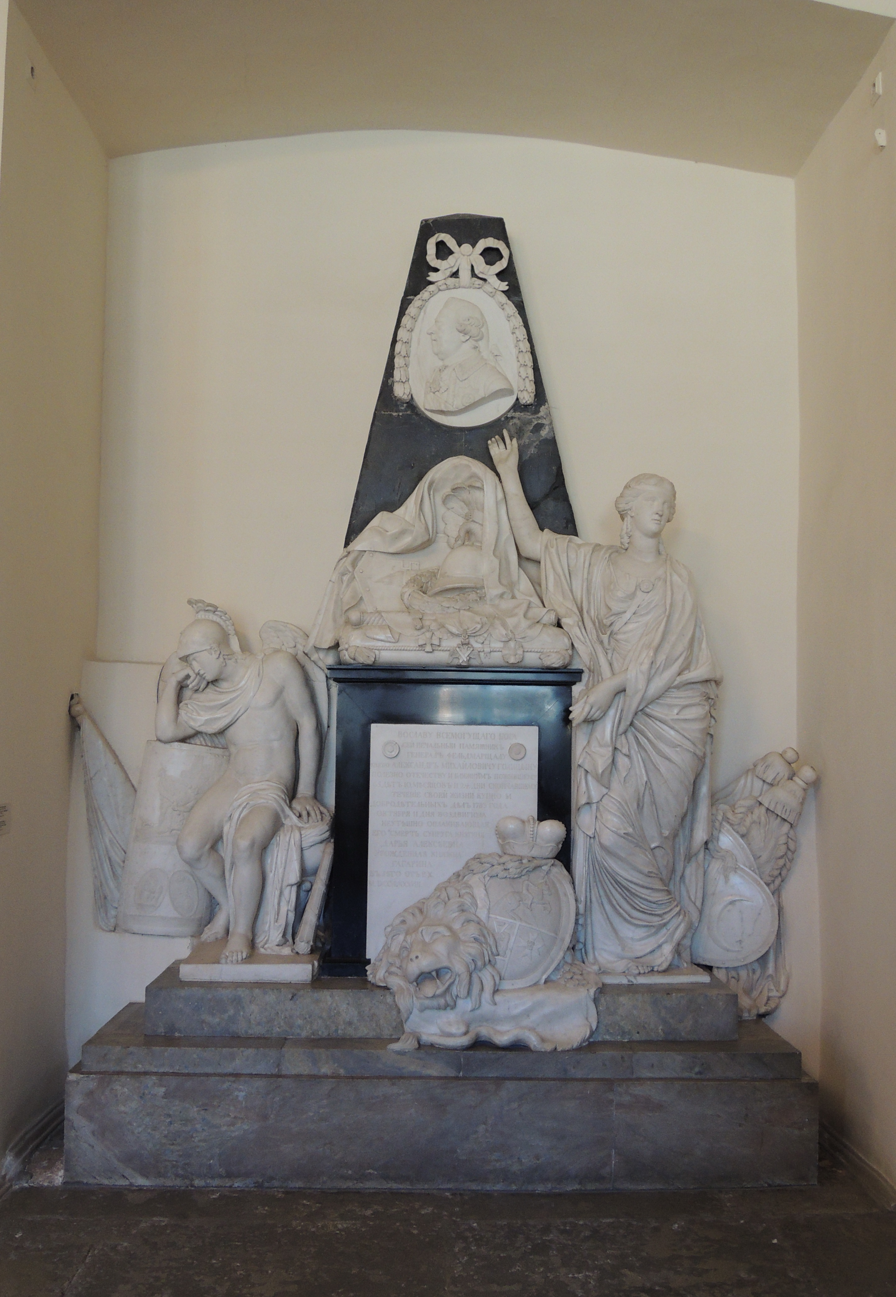 Благовещенская церковь Александро-Невской лавры. Голицын Александр Михайлович 1718-1783. Князь, генерал-фельдмаршал, генерал-адъютант, действительный камергер, сенатор. Главнокомандующий Санкт-Петербурга с января по декабрь 1775 г. и в 1780-1783 гг. Принадлежал к старинному роду. Командующий армией в русско-турецкой войне (1768-1774). Скульптурный памятник. Мрамор. Скульптор Ф. Г. Гордеев, 1788 г. Надпись: «Во славу всемогущего Бога сей печальный памятник генерал фельдмаршалу князю Александру Михайловичу Голицыну полезно Отечеству и ближним пожившем 65 лет и 10 месяцов и 24 дни скончавшему течение своей жизни купно и добродетельных дел 1783 года октября 11 дня воздвигнула неутешно оплакивающая его смерть супруга княгиня Дарья Алексеевна урожденная княжна Гагарнина в лето от Р.Х. M DCCLXXXVIII». День рождения 7 января (по старому стилю). День памяти 23 августа (по старому стилю).